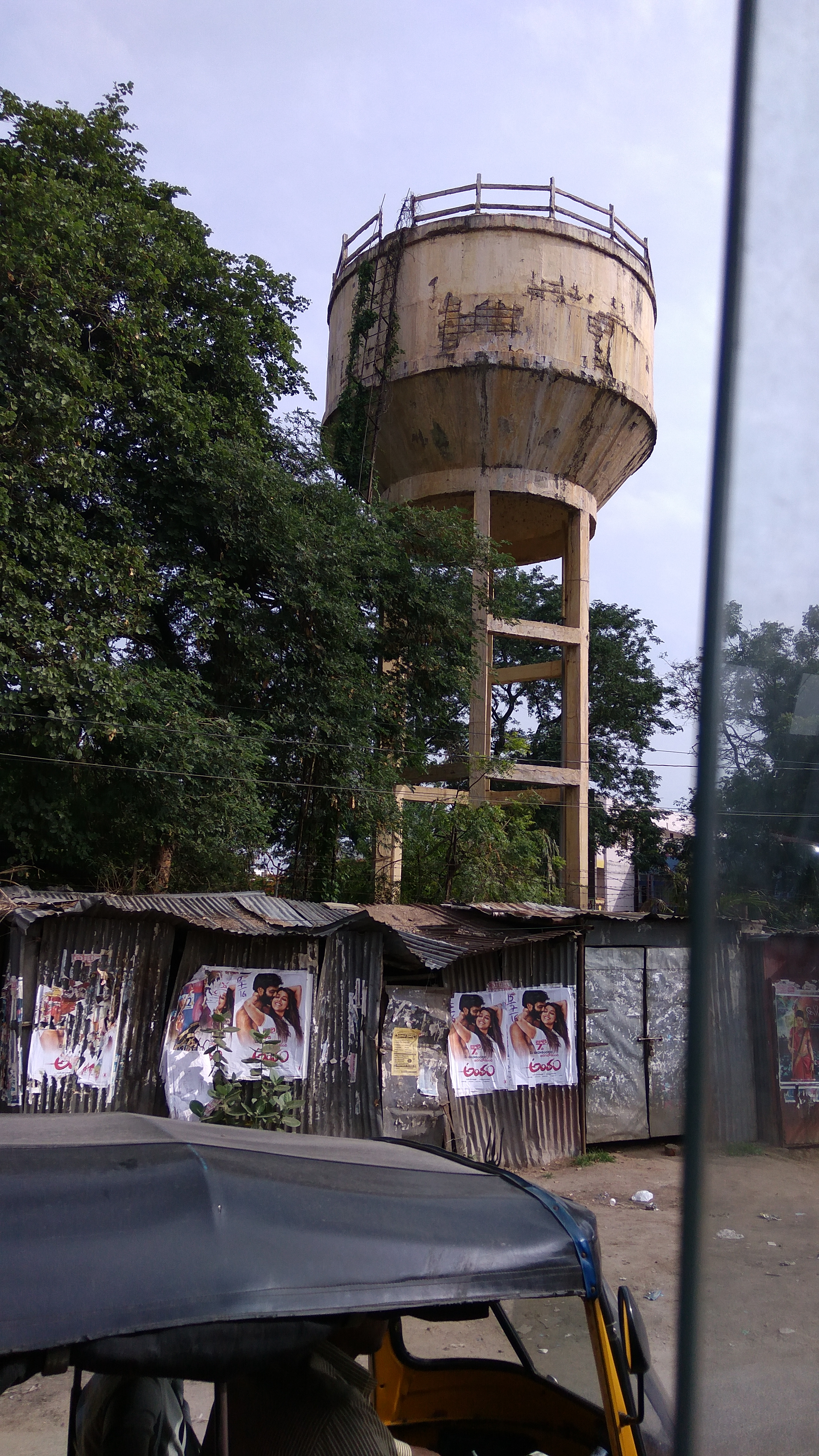 జనగాంలోని నీళ్ల ట్యాంక్